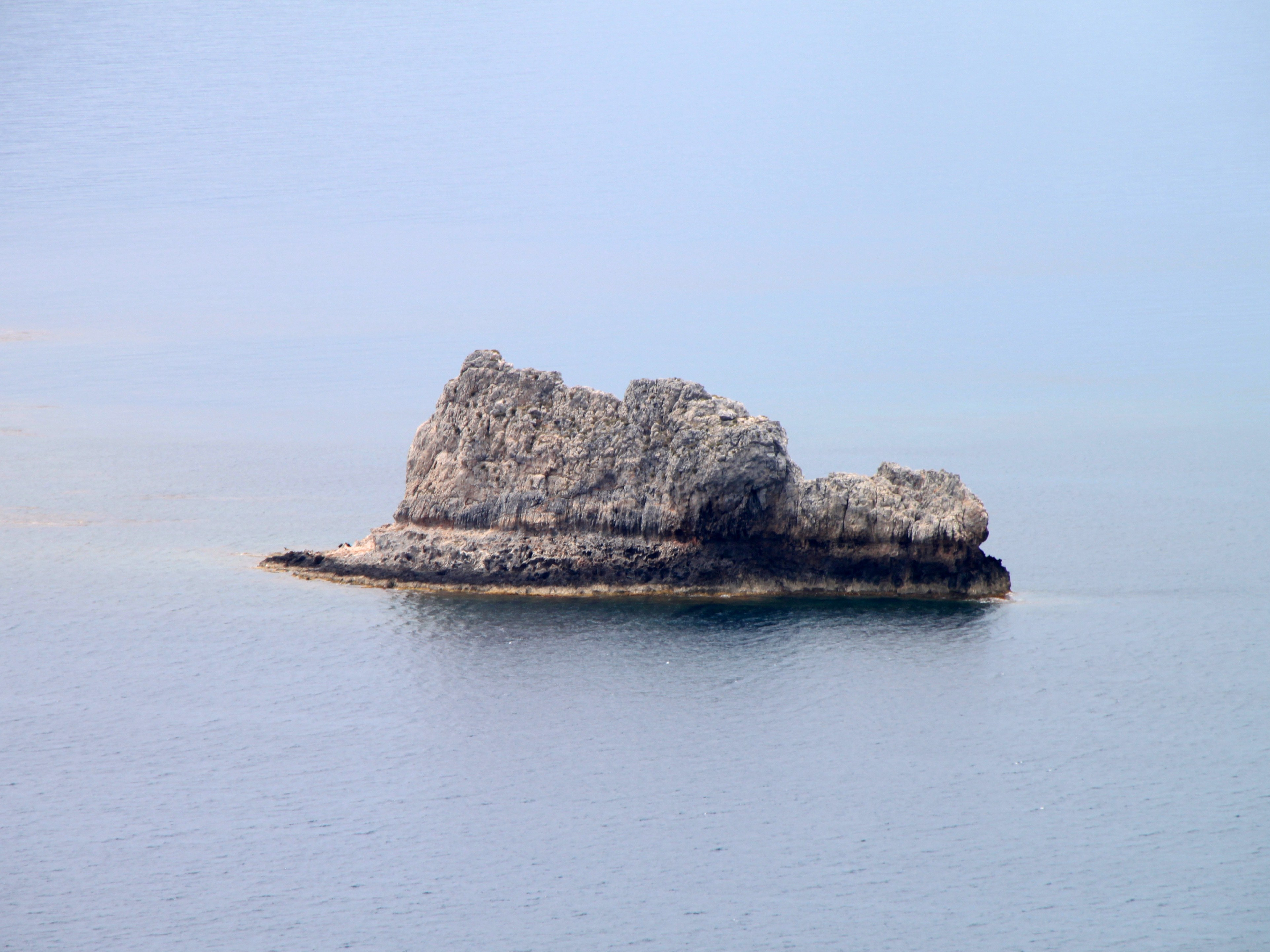 Valenti Rock, kleine Felsinsel in der Gemeinde Kissamos, Präfektur Chania, Kreta, Griechenland